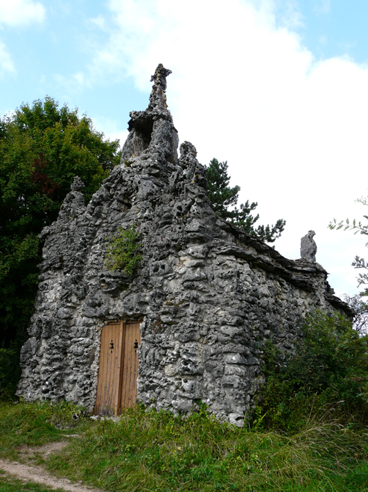 Chapelle Sainte Bologne (martyre du IVème siècle) - 52310 Roôcourt la Côte (Haute-Marne)